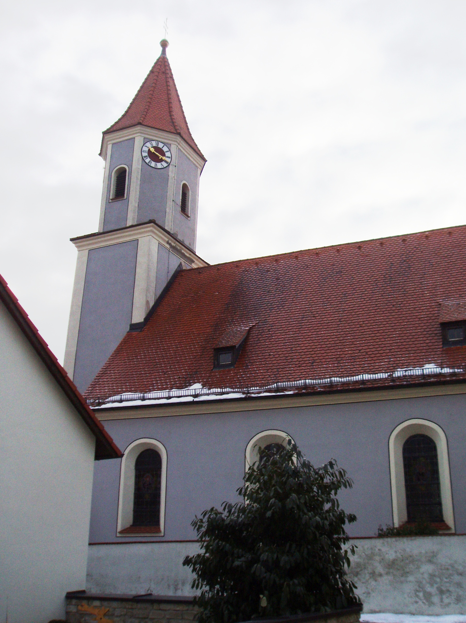 Kath. Pfarrkirche St. Laurentius in Schelldorf im Landkreis Eichstätt, Regierungsbezirk Oberbayern